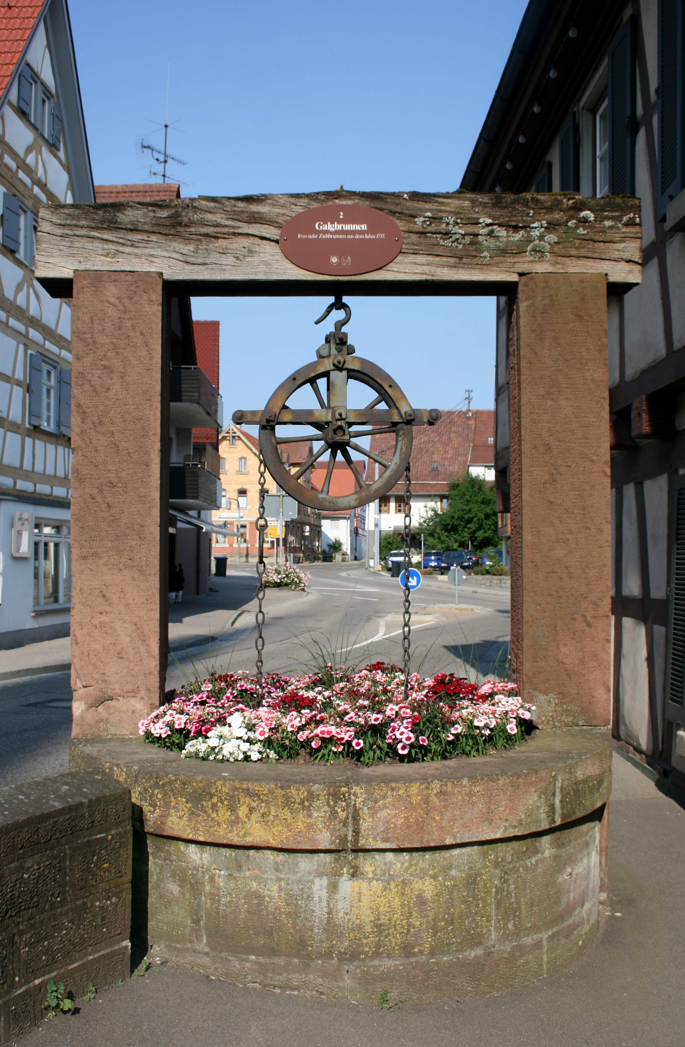 Galgbrunnen am ehemaligen Rathaus von Höfingen, heute Stadtteil von Leonberg: 10 Meter tiefer Ziehbrunnen aus dem Jahr 1737